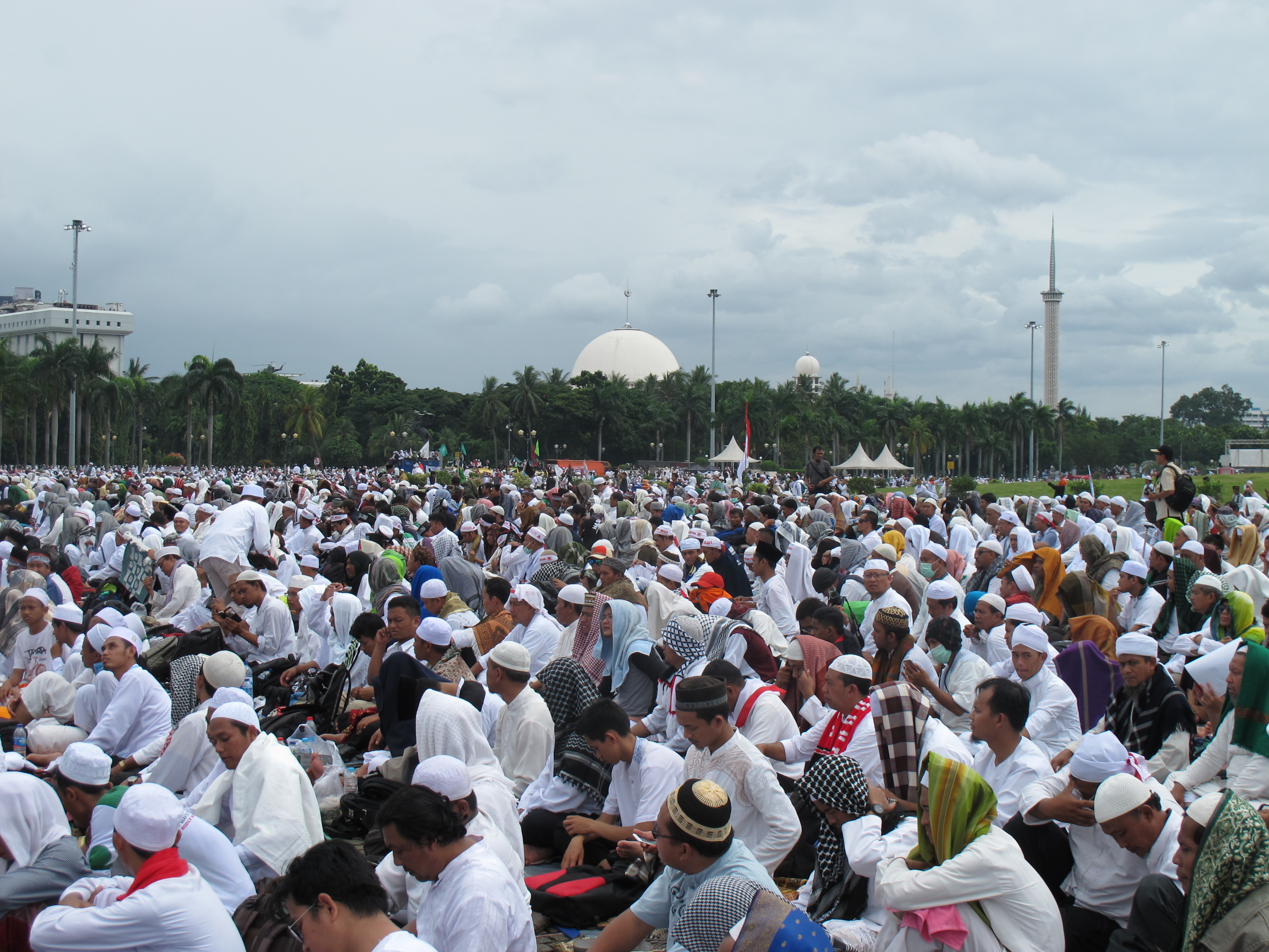 Foto Aksi 2 Desember